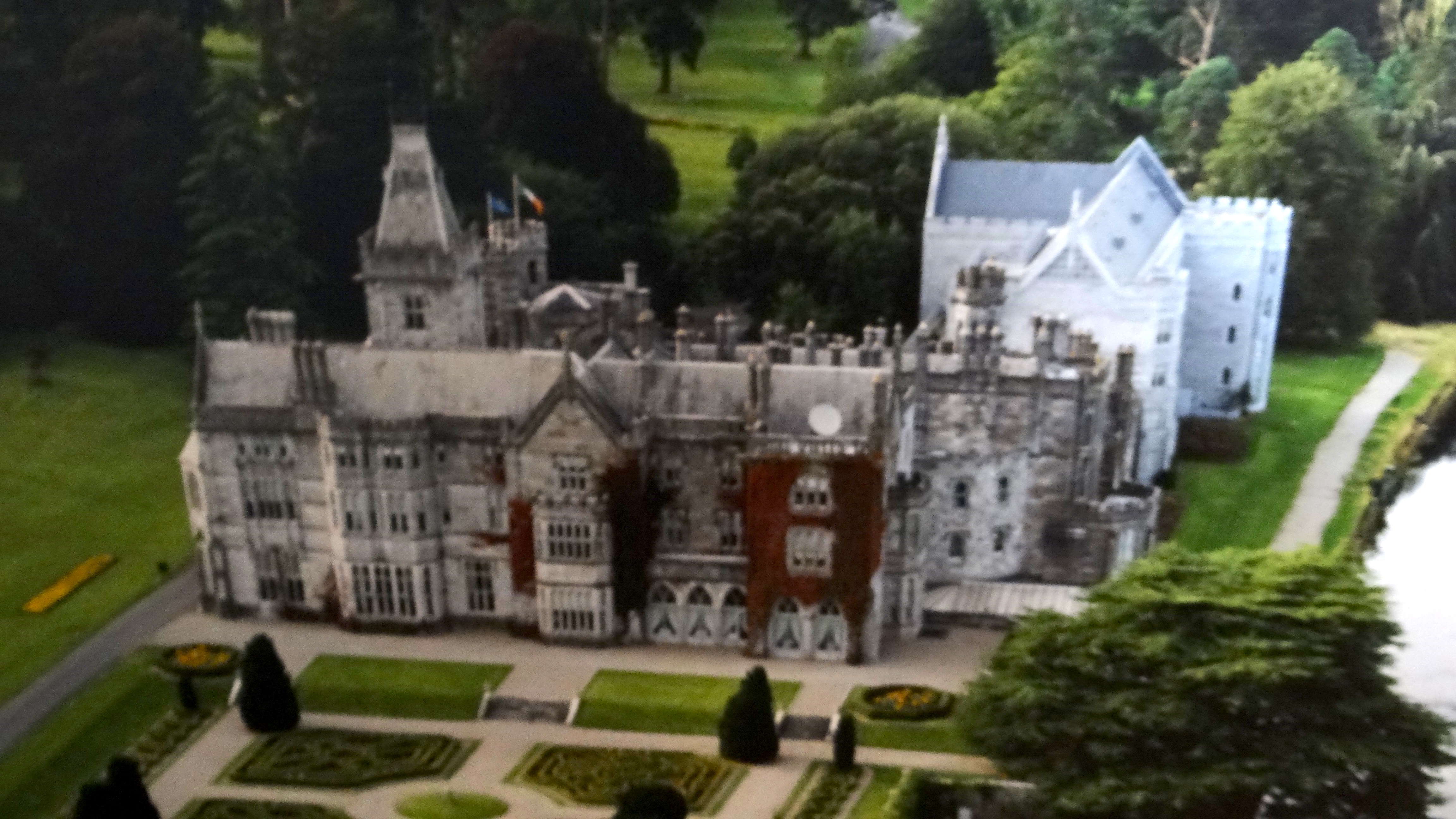 Adare, Irlande, Château